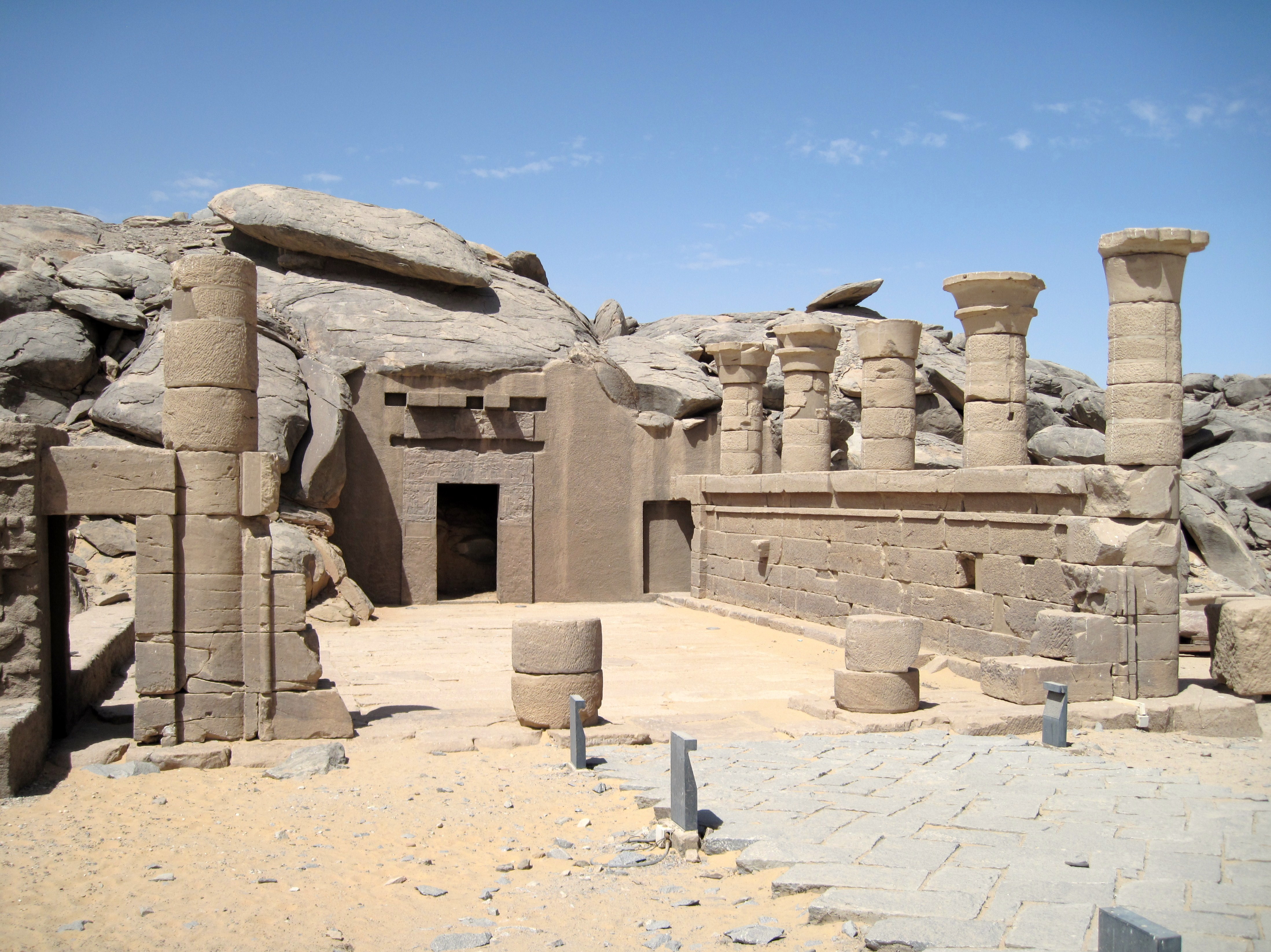 Dem nubischen Gott Dedwen (Dedun) geweihtes Mammisi, das sich ursprünglich innerhalb der Umfassungsmauer des Mandulis-Tempels befand, im Freilichtmuseum auf der Insel Neu-Kalabscha im Nassersee, Ägypten